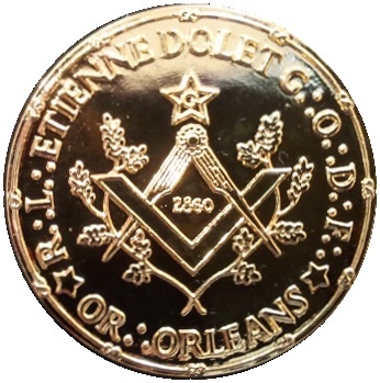 jeton sceau de la loge Etienne Dolet 110 ans Grand Orient de France